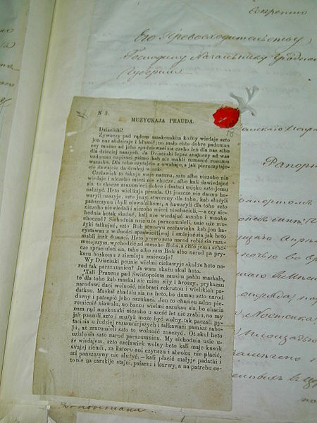 Мужыцкая праўда